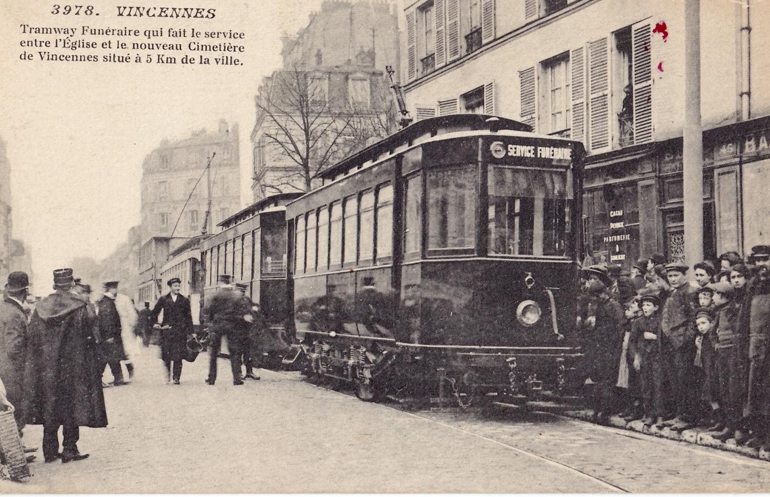 Carte postale ancienne éditée par EM, n°3978 : VINCENNES - Tramway funéraire qui fait le service entre l'Eglise et le nouveau cimetière de Vincennes, situé à 5 km de la ville